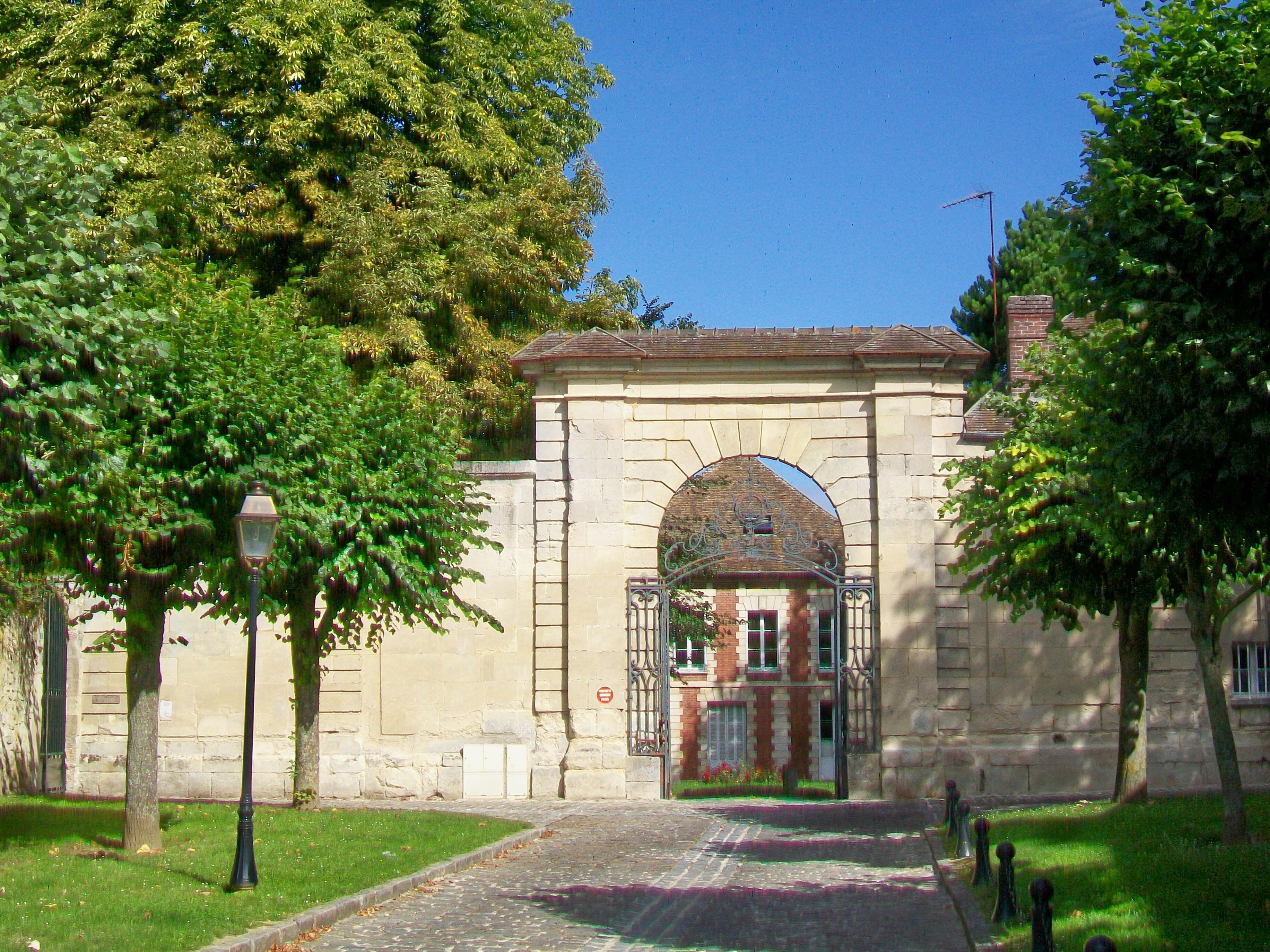 Le portail de l'ancienne abbaye Saint-Arnould, place Saint-Arnould, à l'extrémité nord-ouest de la vieille ville.